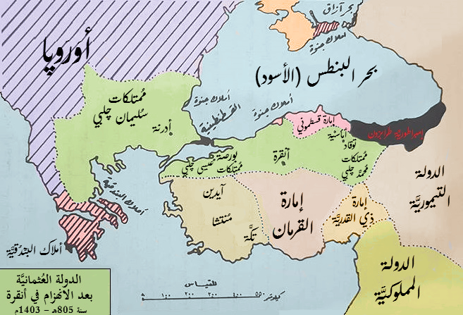 الدولة العُثمانيَّة والإمارات والدُويلات المُحيطة بها بعد معركة أنقرة سنة 805هـ المُوافقة لِسنة 1403م.